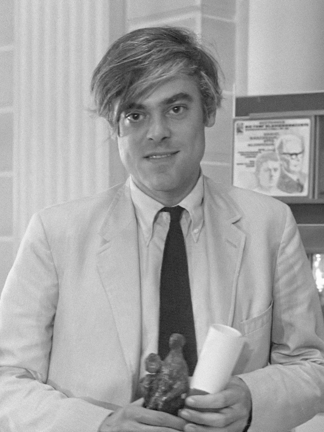 Frans Brüggen, Klassieke Edisons 1969 worden uitgereikt in het Concertgebouw Amsterdam. 3 oktober 1969